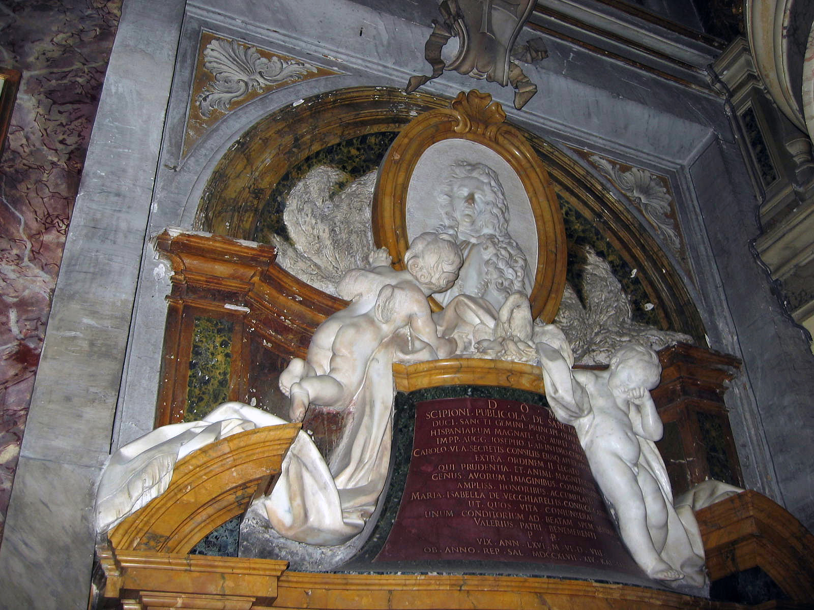 Giovanni Battista Maini - Monument to Scipione Publicola Santacroce (1749). Santa Maria in Publicolis, Rome. Picture by Torvindus.